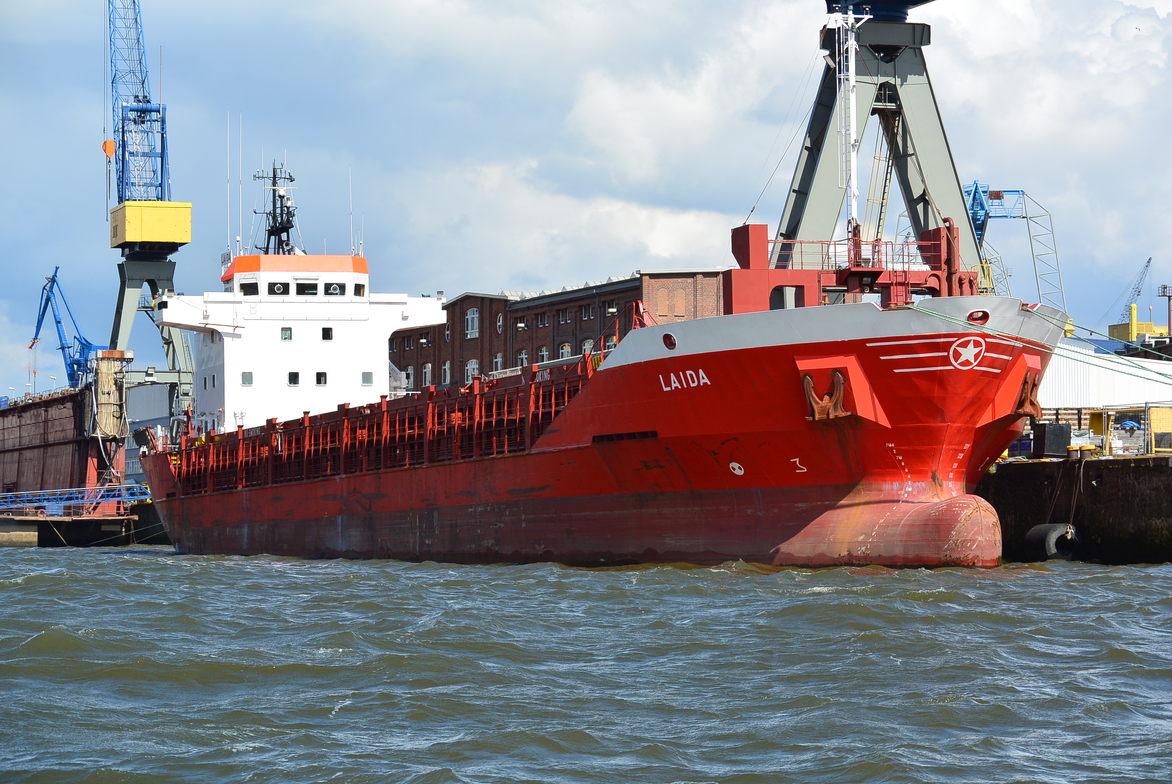 Frachter Laida im Hamburger Hafen 2015